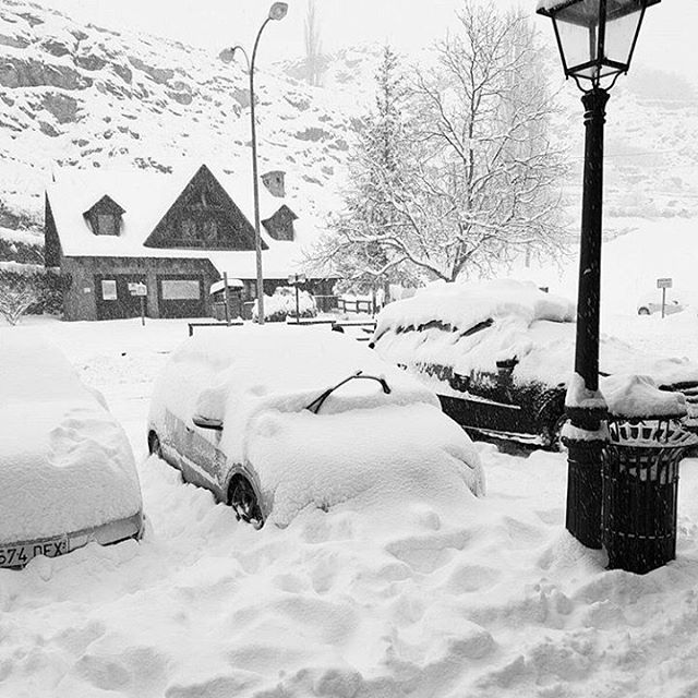 Nieve en el valle de benasque